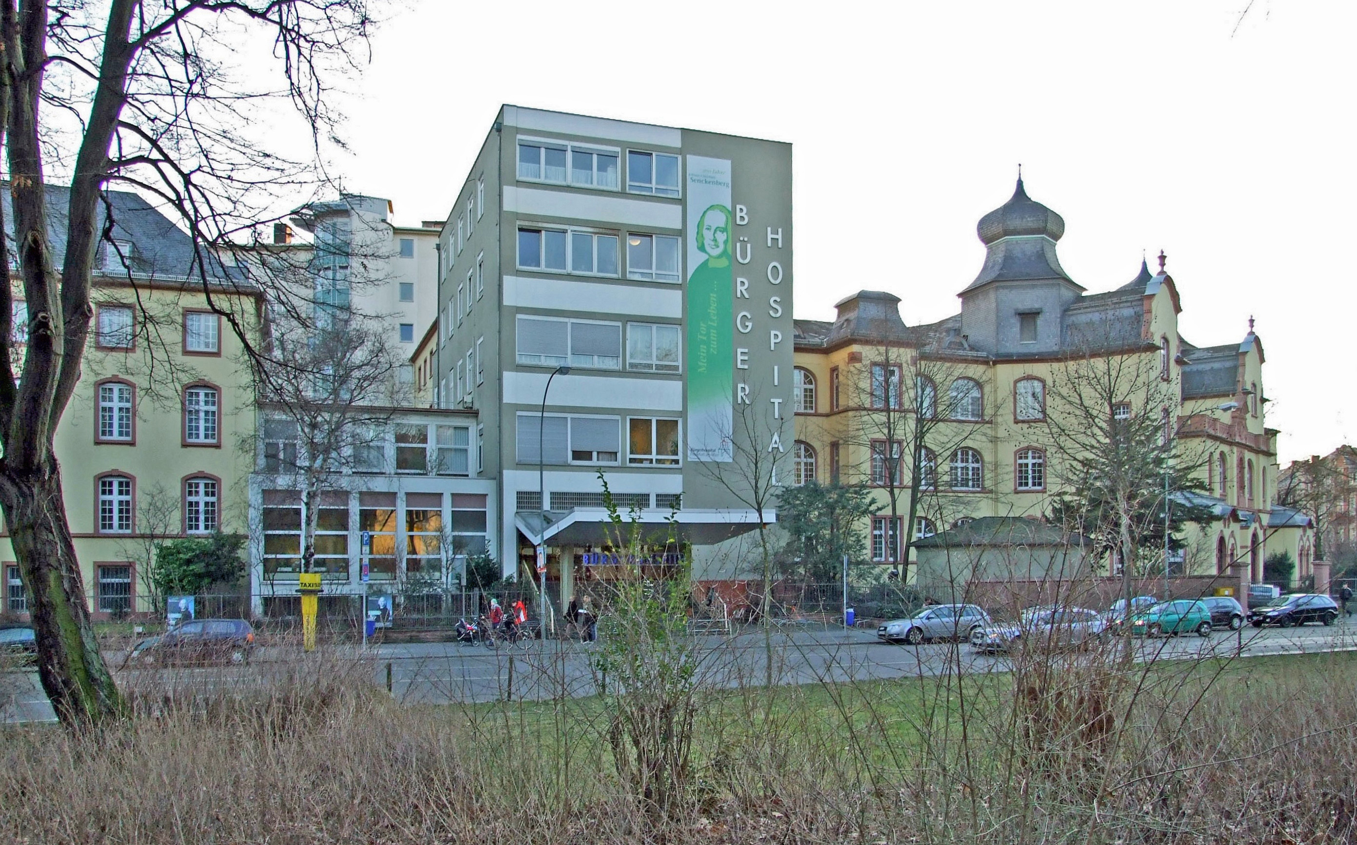 Buergerhospital in Ffm